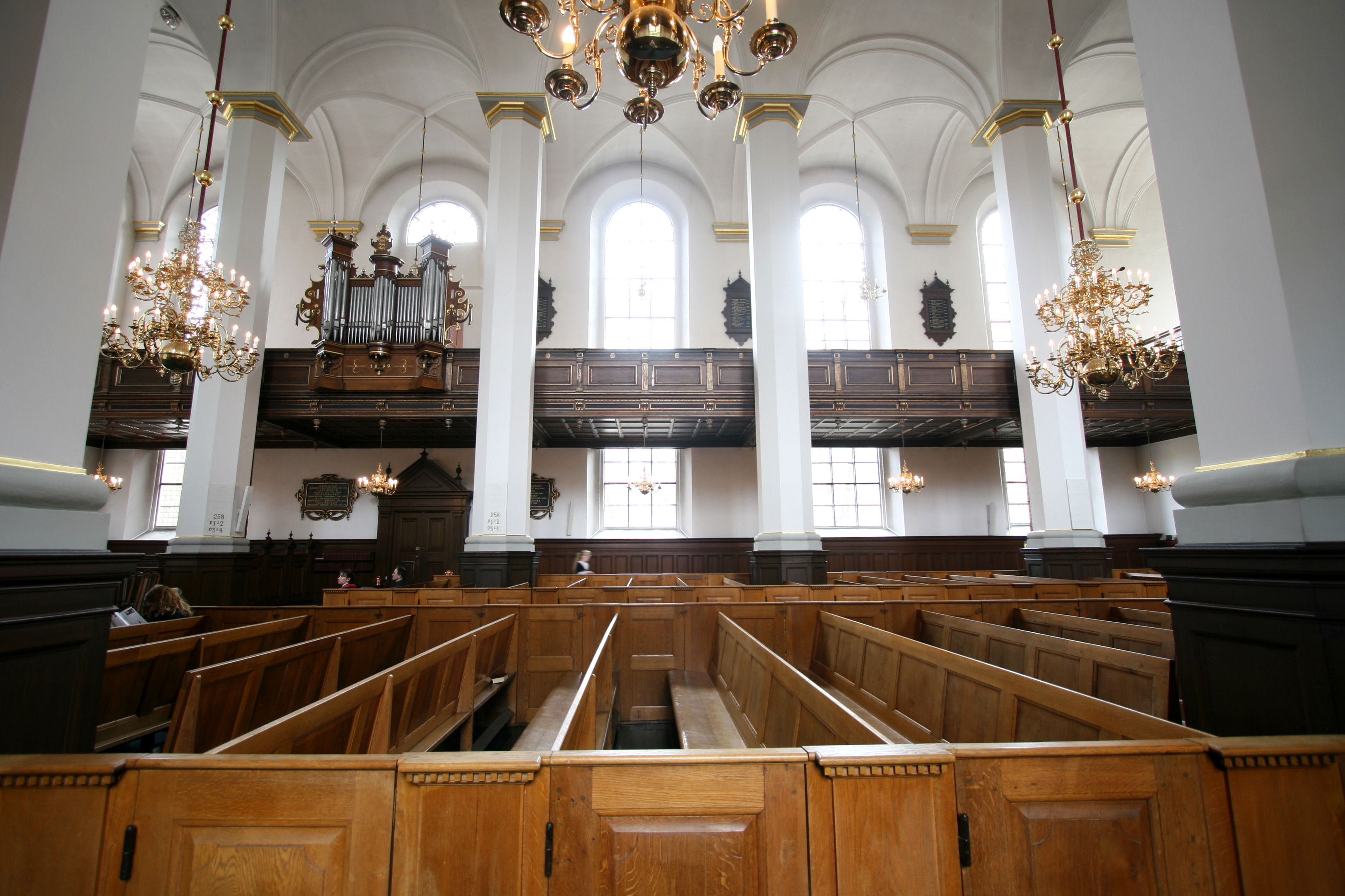 Helligåndskirken, Copenhagen, Denmark. Interior across from north.